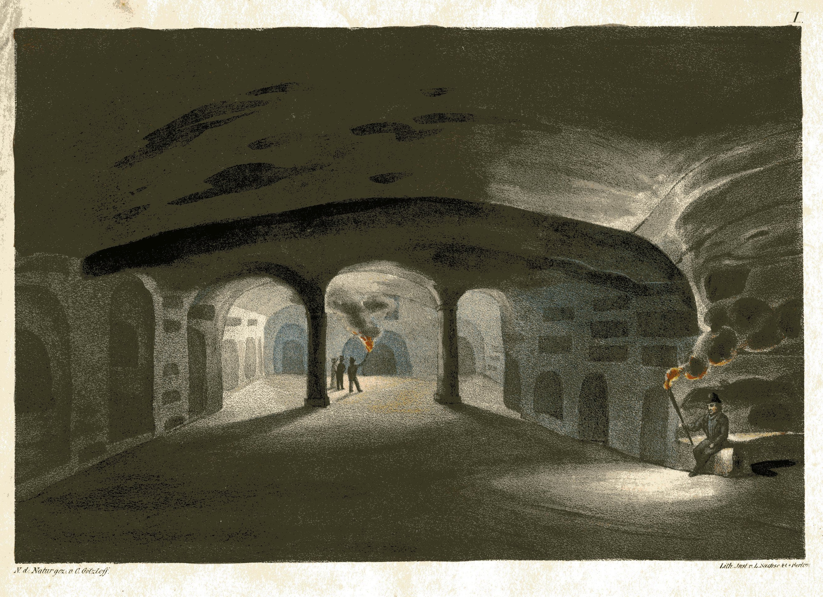 Carl Wilhelm Götzloff (1799-1866): Katakomben des heiligen Januarius, 1828/29.